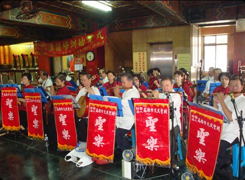 中文（台灣）: 文武聖殿樂府聖樂團；使用本圖片請遵循(CC 姓名標示-非商業性-禁止改作)，Please follow (CC BY-NC-ND 3.0 TW)